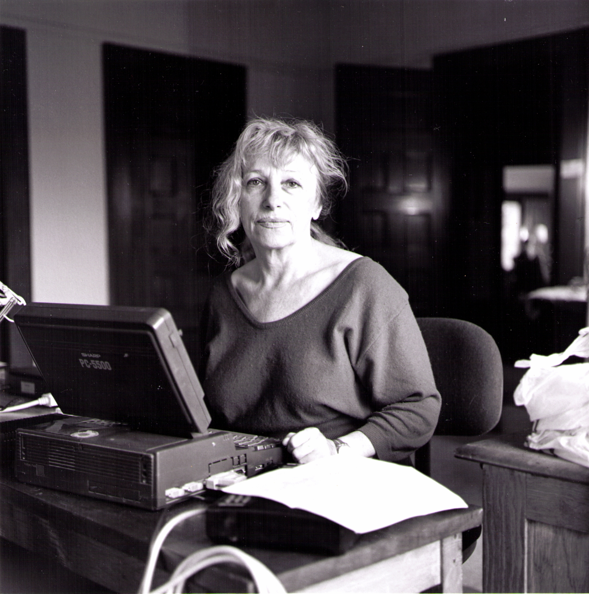 במושבת האמנים יאדו, ארה״ב